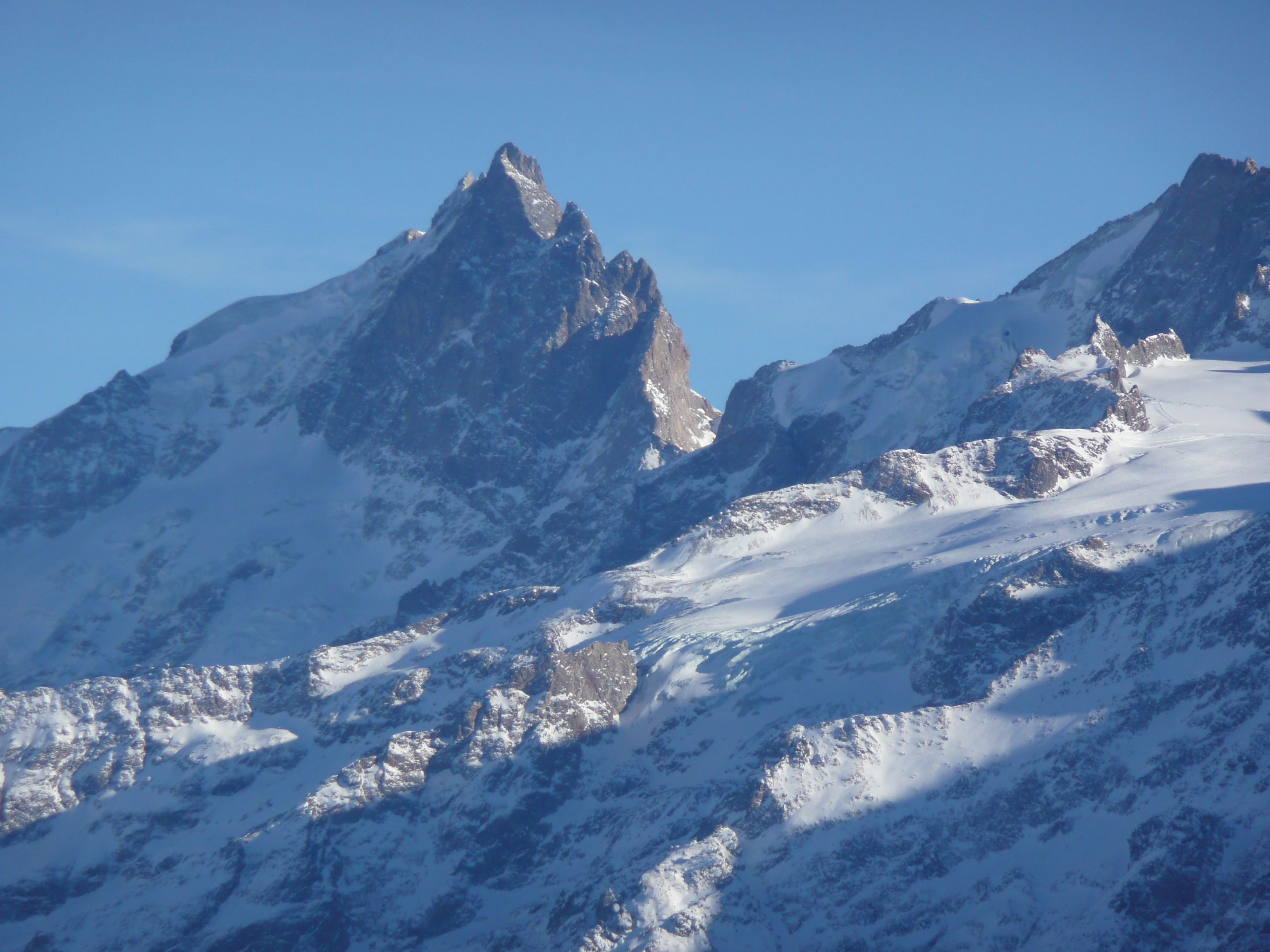 La Meije